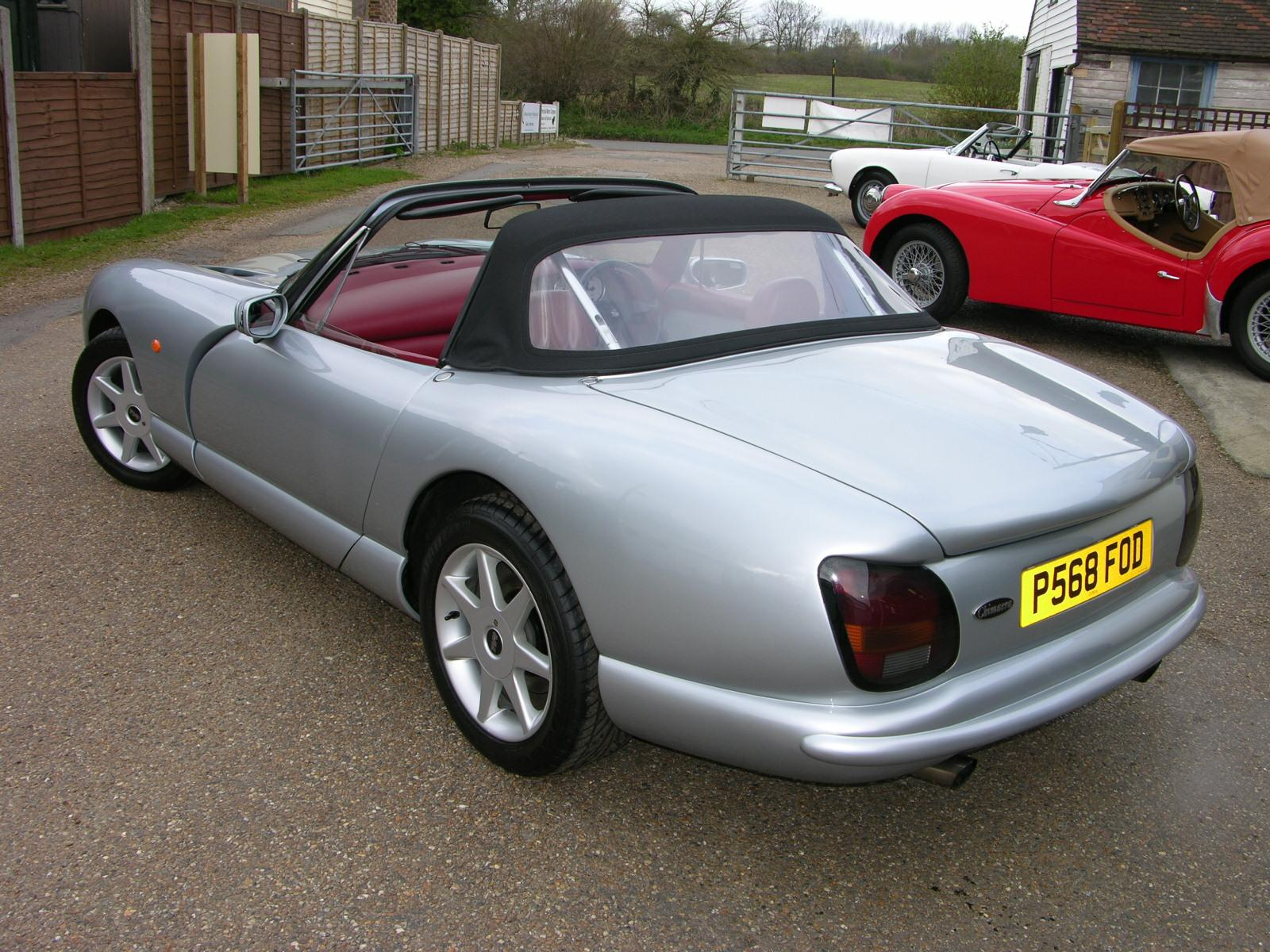 1997 TVR Chimaera 4.0